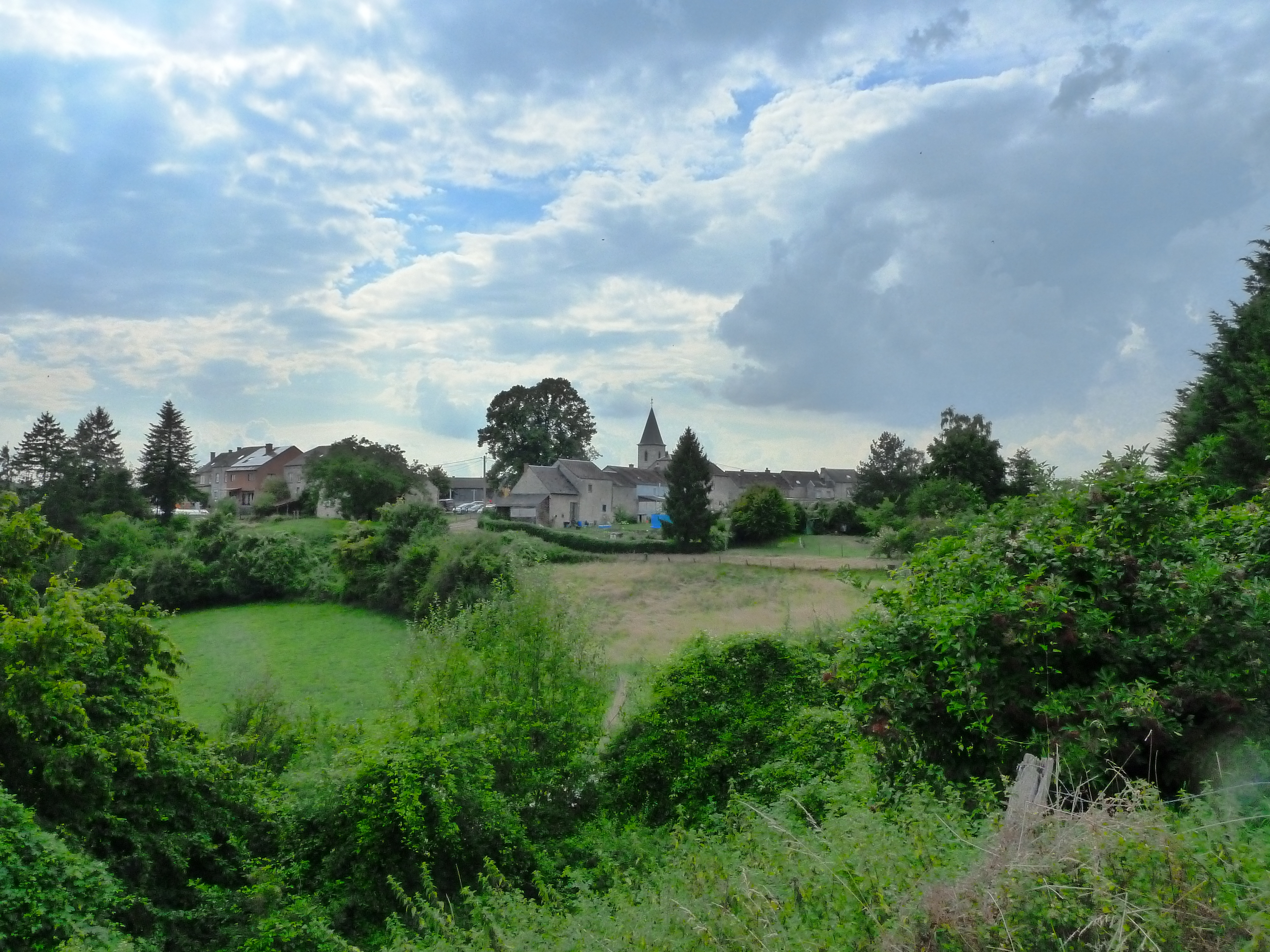 Vue du village